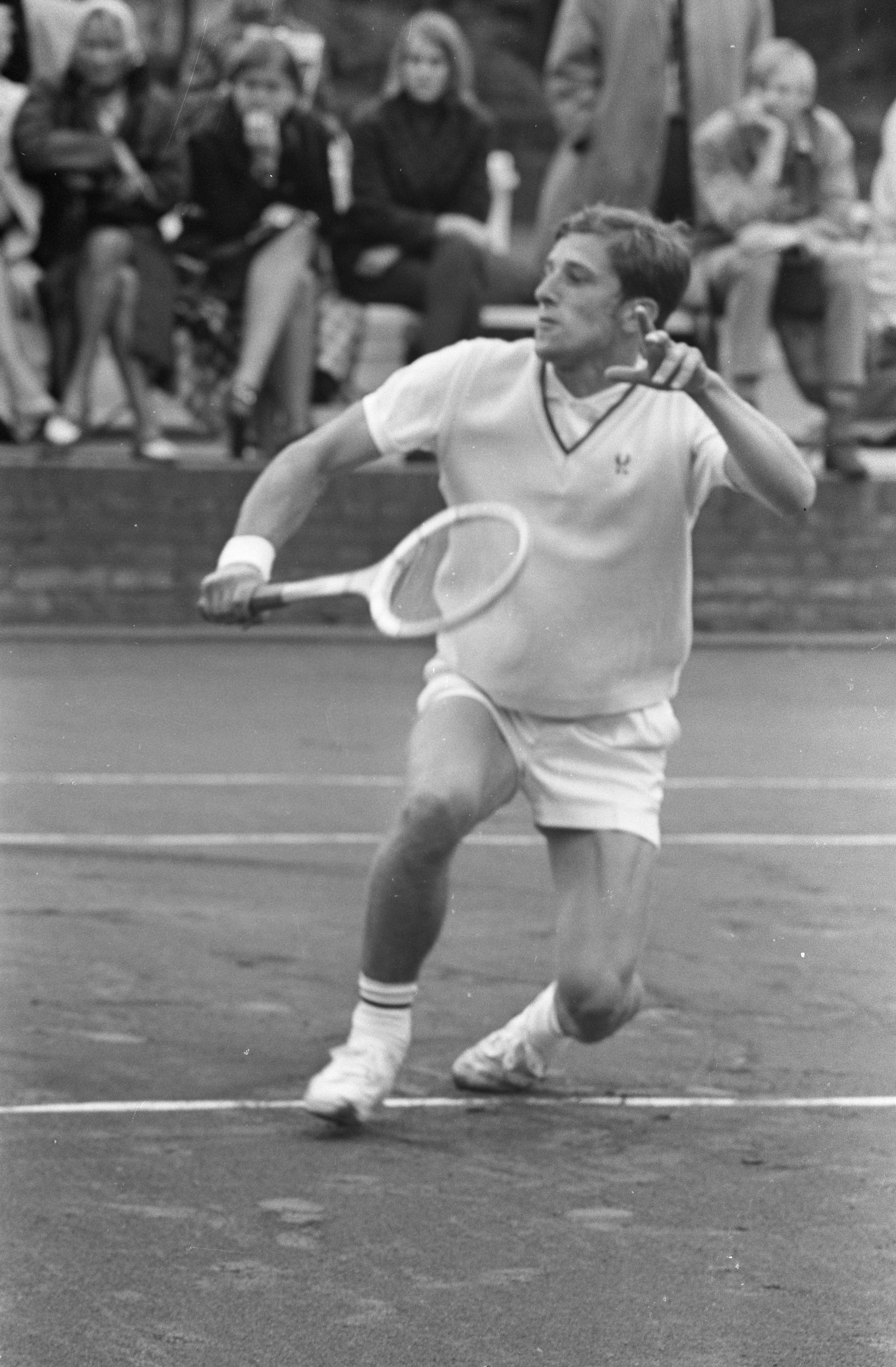 Collectie / Archief : Fotocollectie Anefo Reportage / Serie : [ onbekend ] Beschrijving : Tennis in Hilversum. De Tsjech Koder in aktie Datum : 25 juli 1968 Locatie : Hilversum, Tsjechië Trefwoorden : TENNIS Fotograaf : Kroon, Ron / Anefo Auteursrechthebbende : Nationaal Archief Materiaalsoort : Negatief (zwart/wit) Nummer archiefinventaris : bekijk toegang 2.24.01.05 Bestanddeelnummer : 921-5372